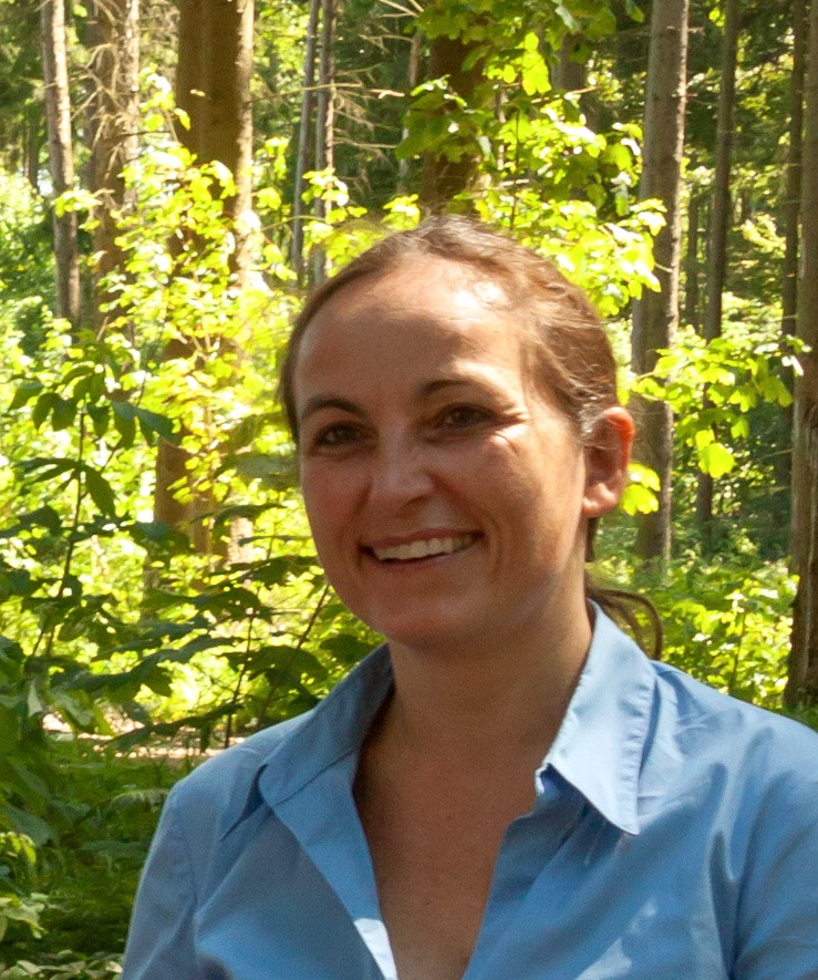 Petra Loenne (prähistorische Archäologin)